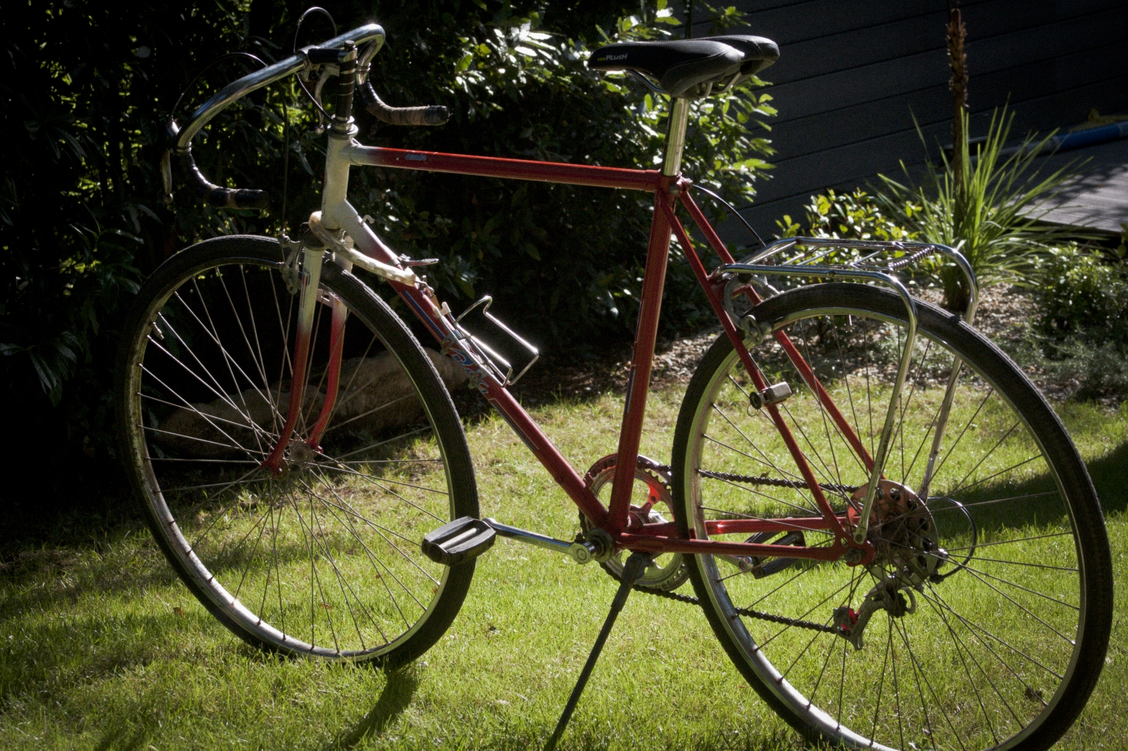 Rog Senior